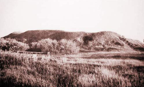 Беларуская (тарашкевіца): Дрысьвяты (Dryśviaty). Выспа Замак